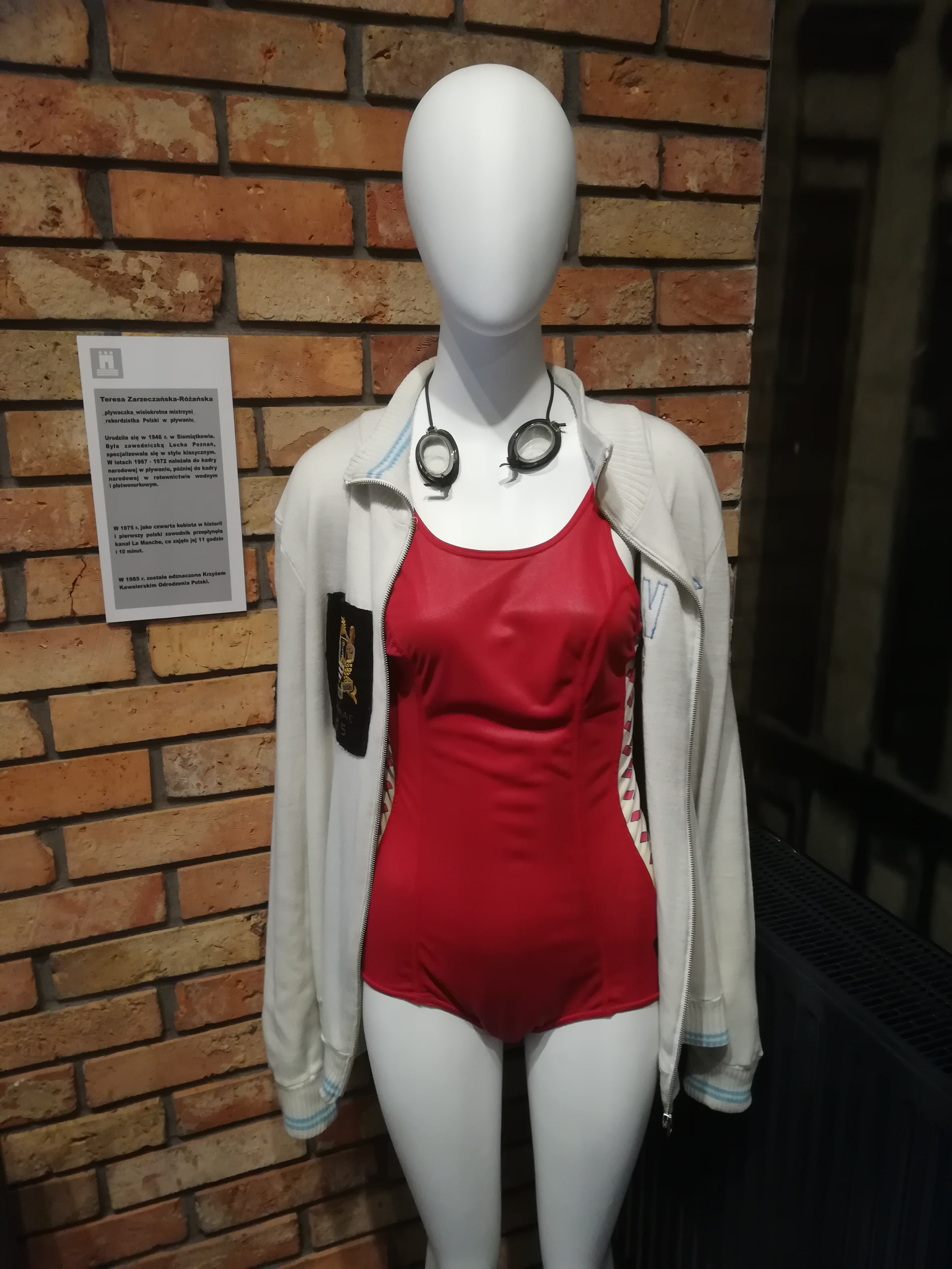 Swarzędzkie Centrum Historii i Sztuki - strój Teresy Zarzeczańskiej-Różańskiej.